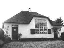 Werk von Baruch Lopes de Leao Laguna